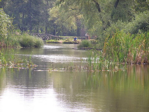 A Mátrafüreden található Sás-tóról készült fényképem.